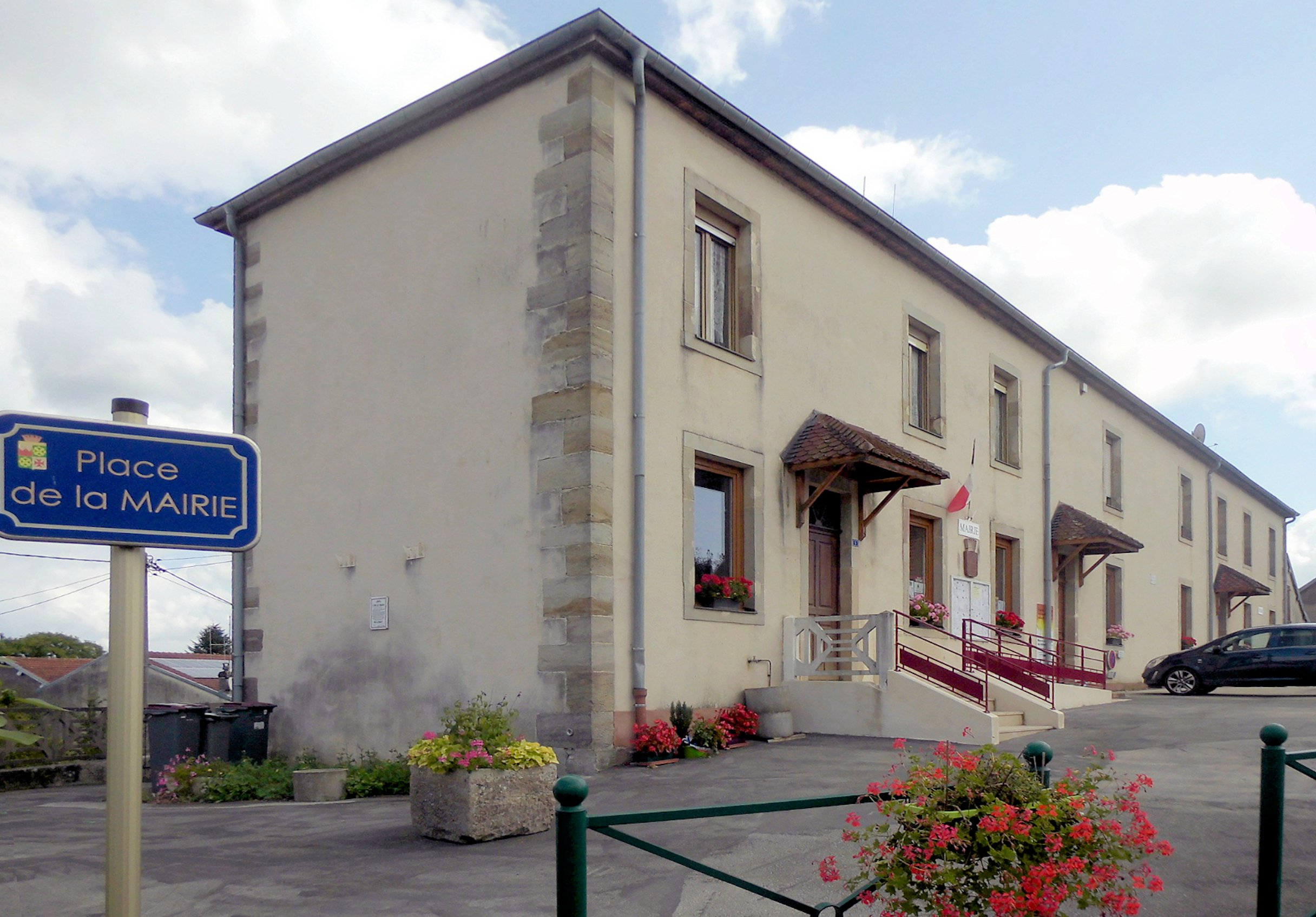 La mairie-école de Melincourt